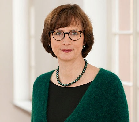 Porträt der Darmstädter Regierungspräsidentin Brigitte Lindscheid von 2014